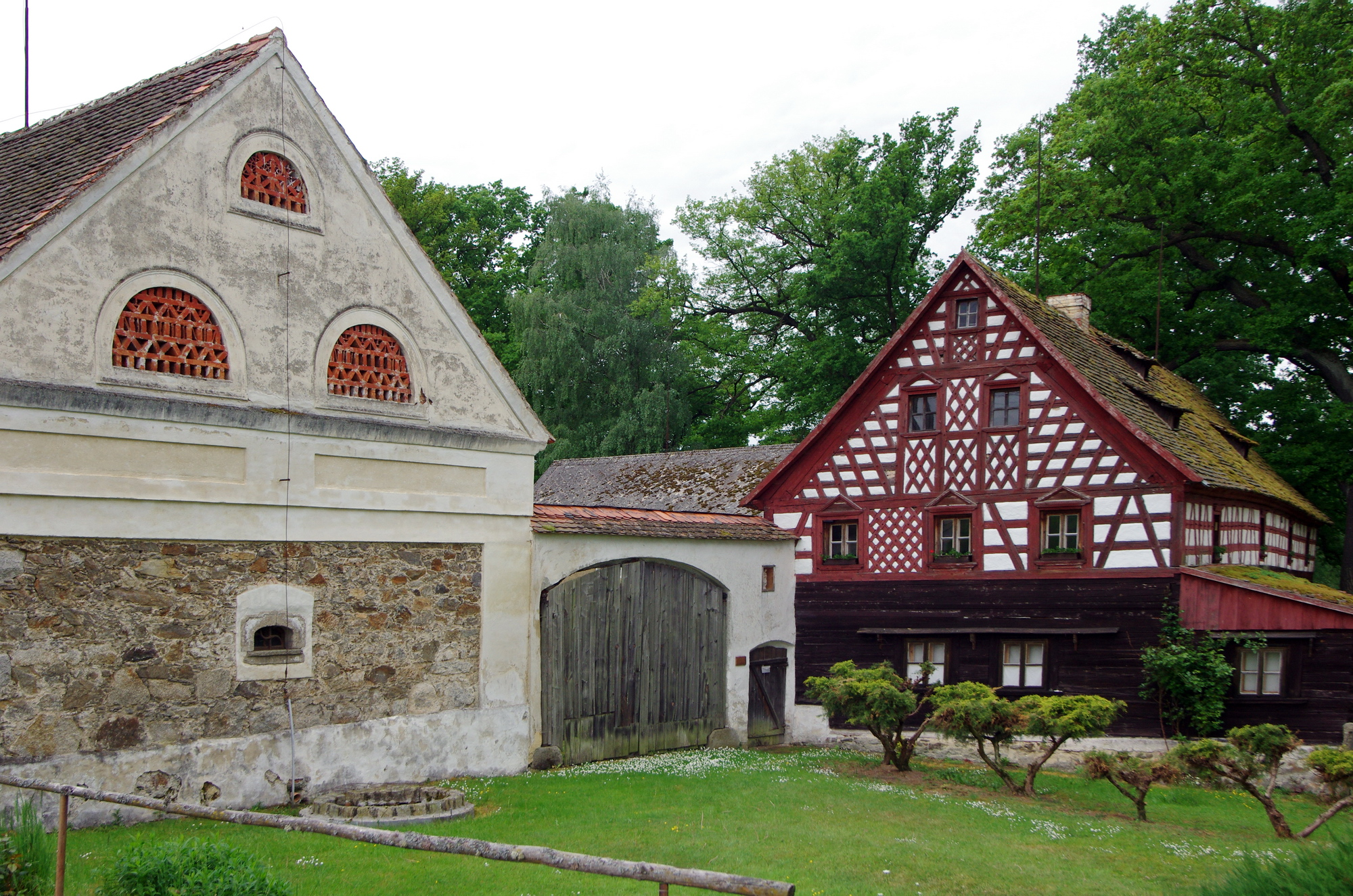 Usedlost čp. 3, Tuřany 3, Tuřany (okres Cheb).